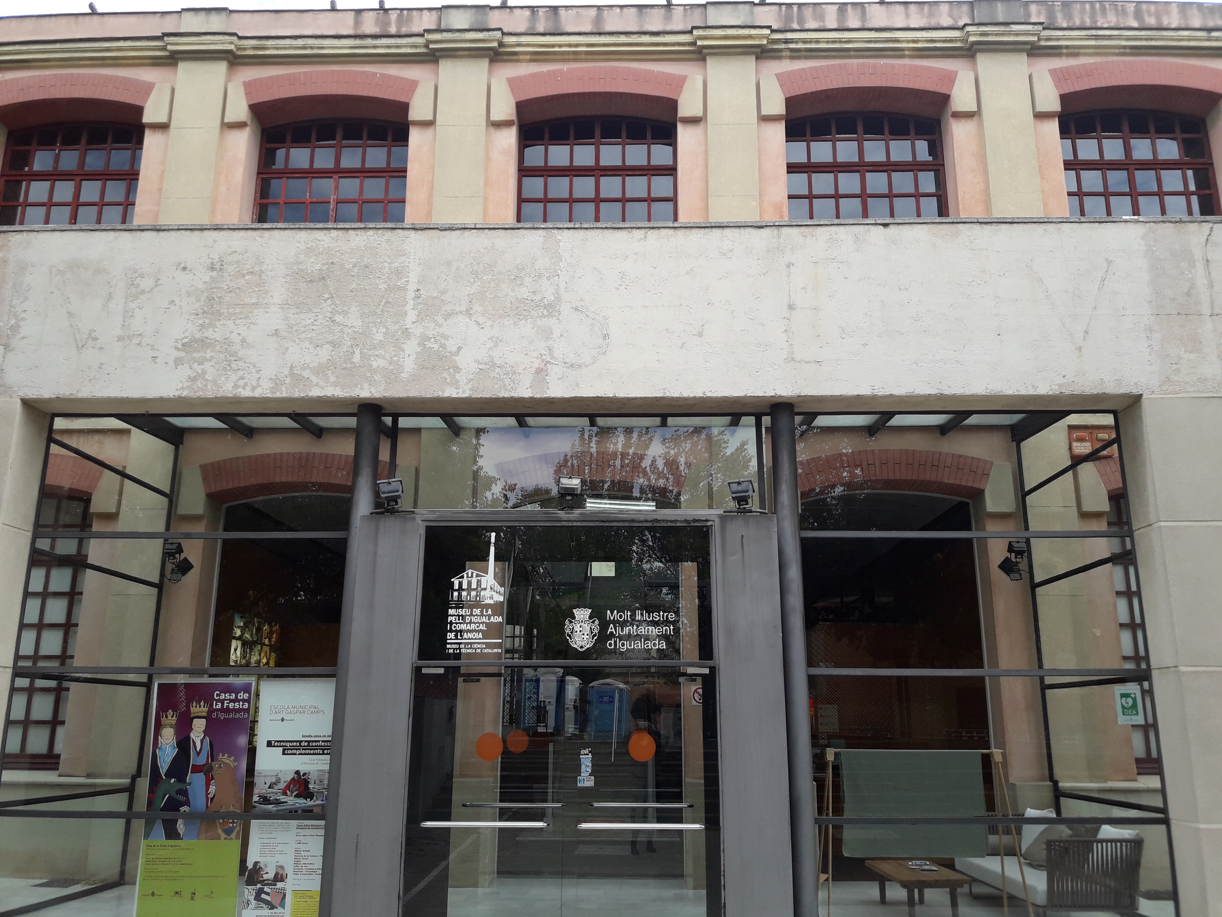 Entrada del Museu de la Pell d'Igualada